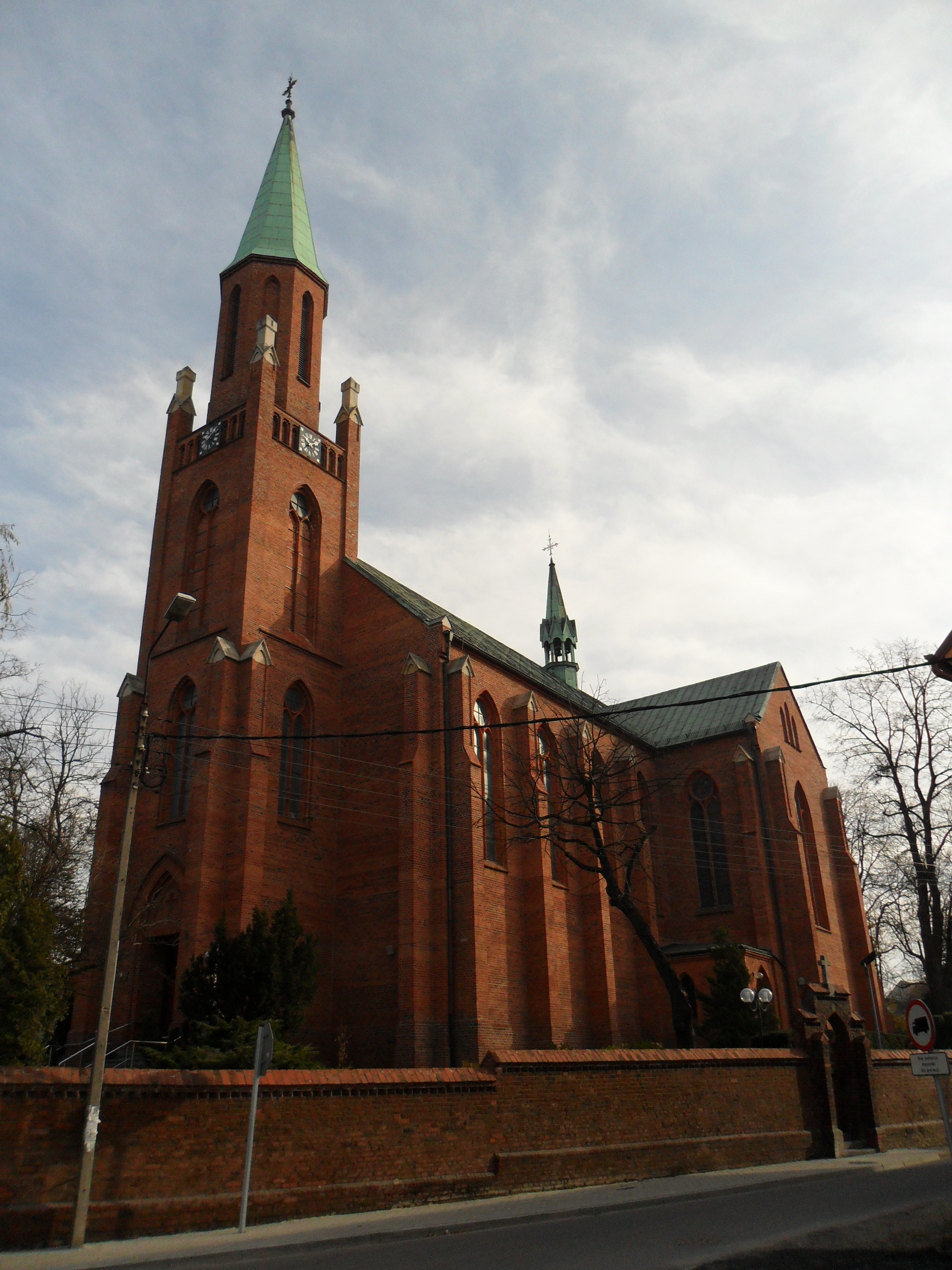 Kościół św. Jadwigi w Raciborzu-Markowicach